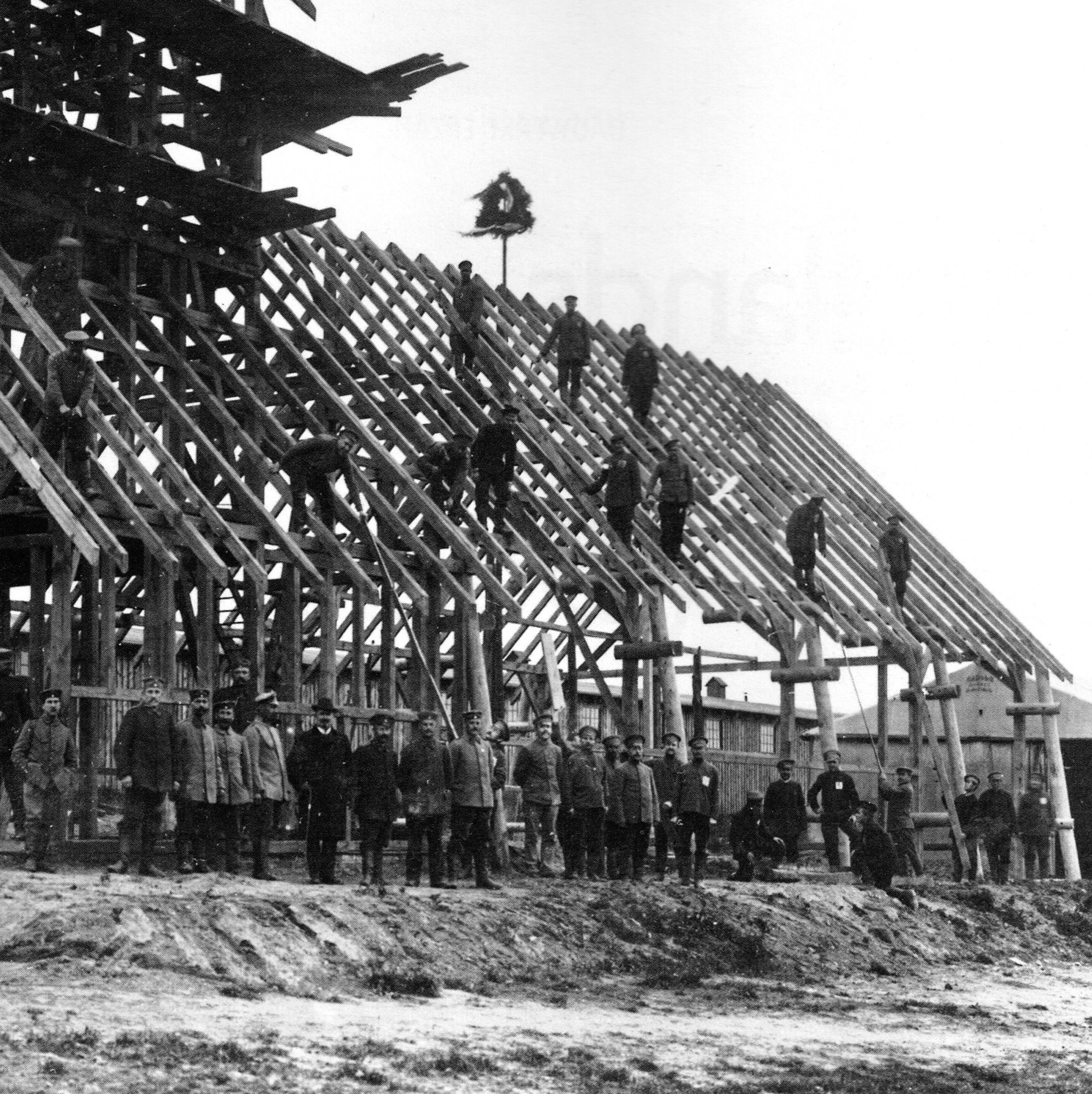 Heilandskapelle Frankfurt (Oder). Richtfest 1915